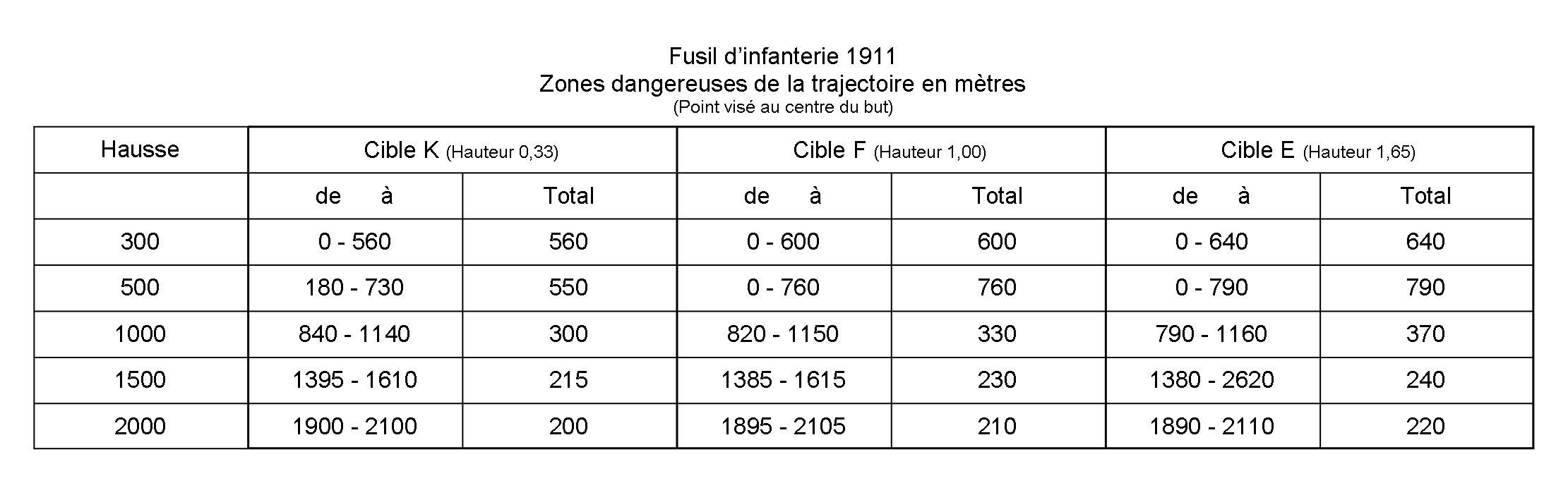 Zones dangereuses du fusil suisse d’infanterie 1911